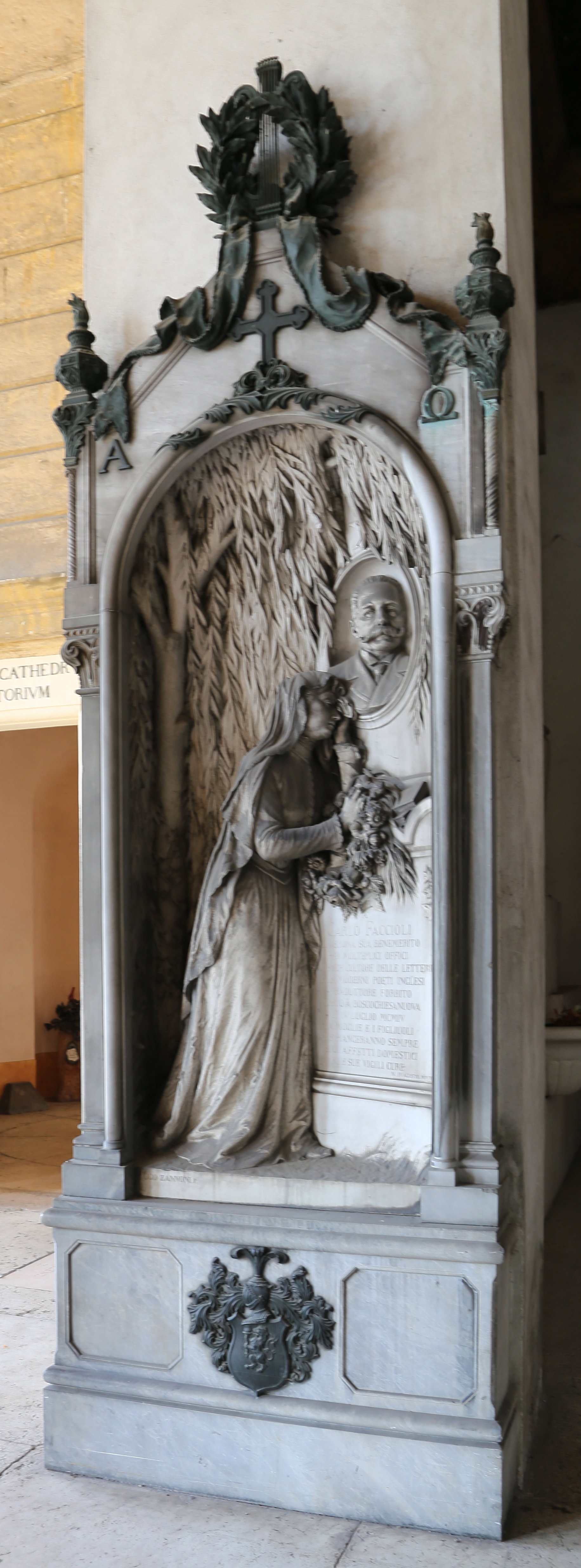 cimitero monumentale di Verona This is a photo of a monument which is part of cultural heritage of Italy.